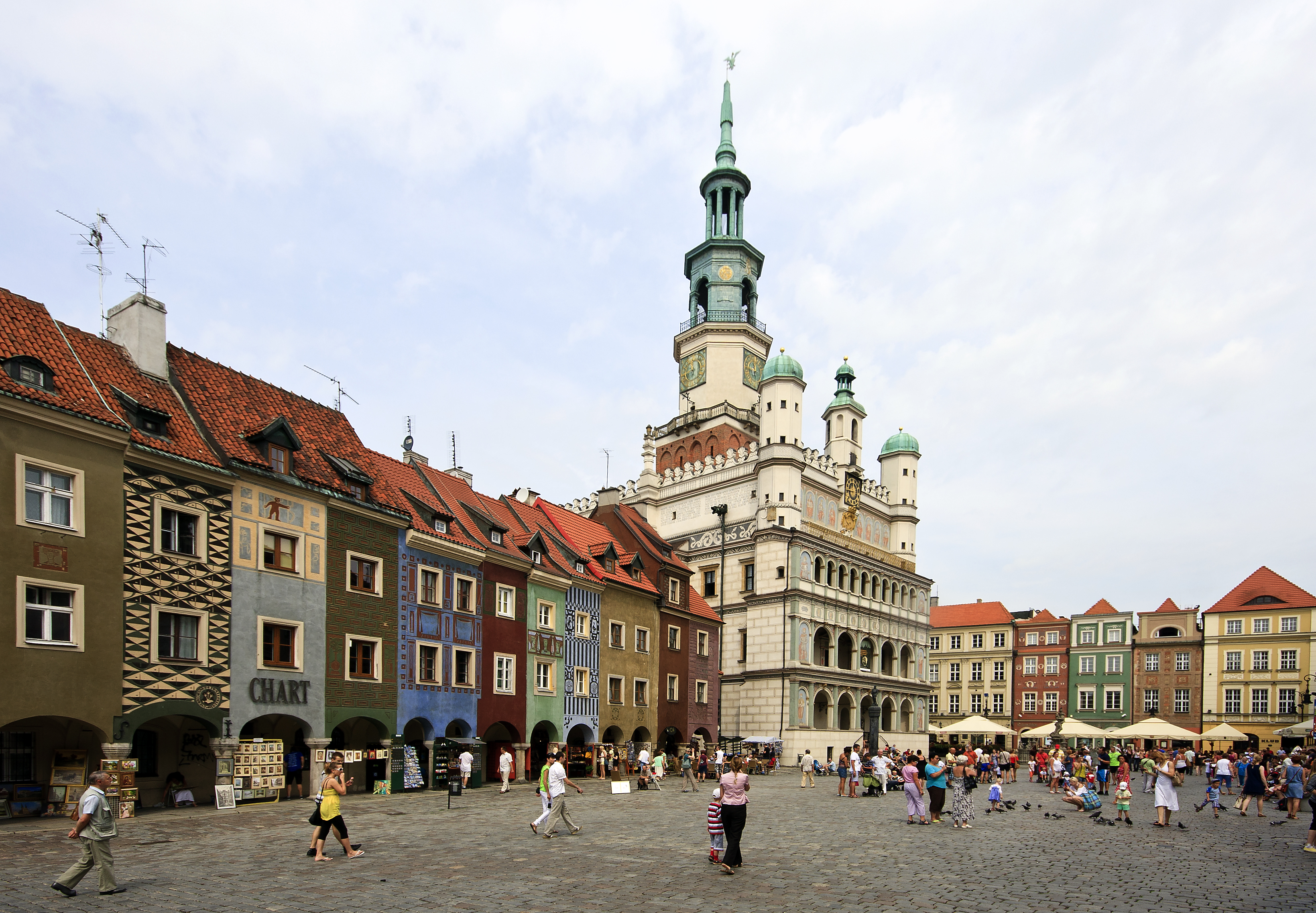 Gamla marknadsplatsen i Poznań, där rådhuset reser sig över övriga byggnader.